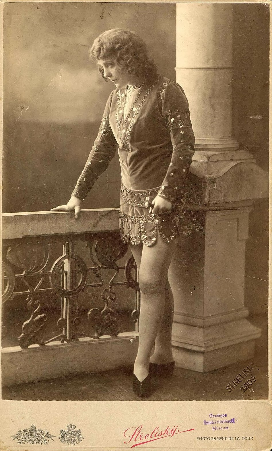 Török Irma a Bizánc című előadásban, Herma szerepében, 1904-ben.